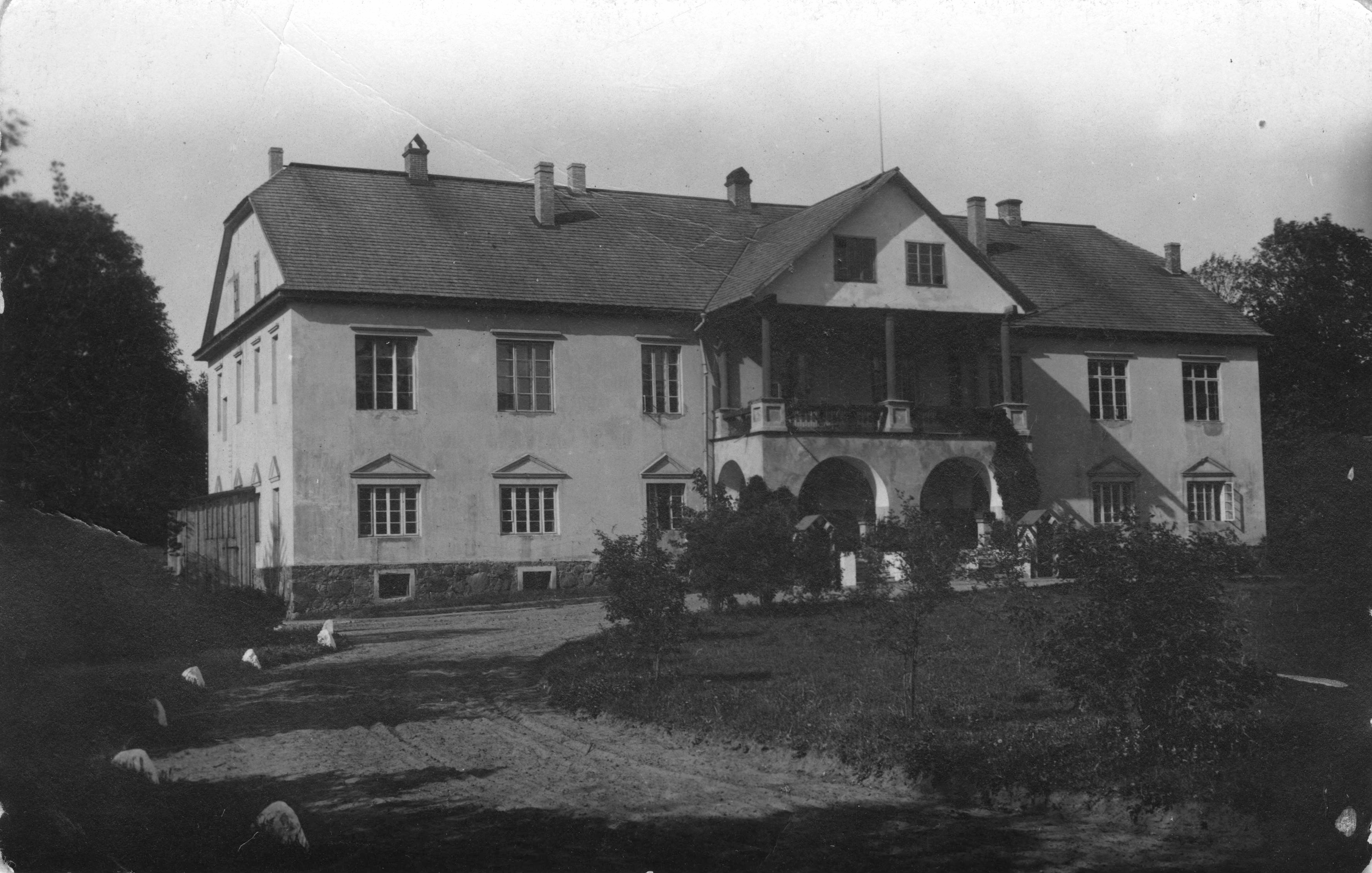 Беларуская (тарашкевіца): Лаздуны (Łazduny), сядзіба Корвін-Мілеўскіх (Korvin-Mileŭski)